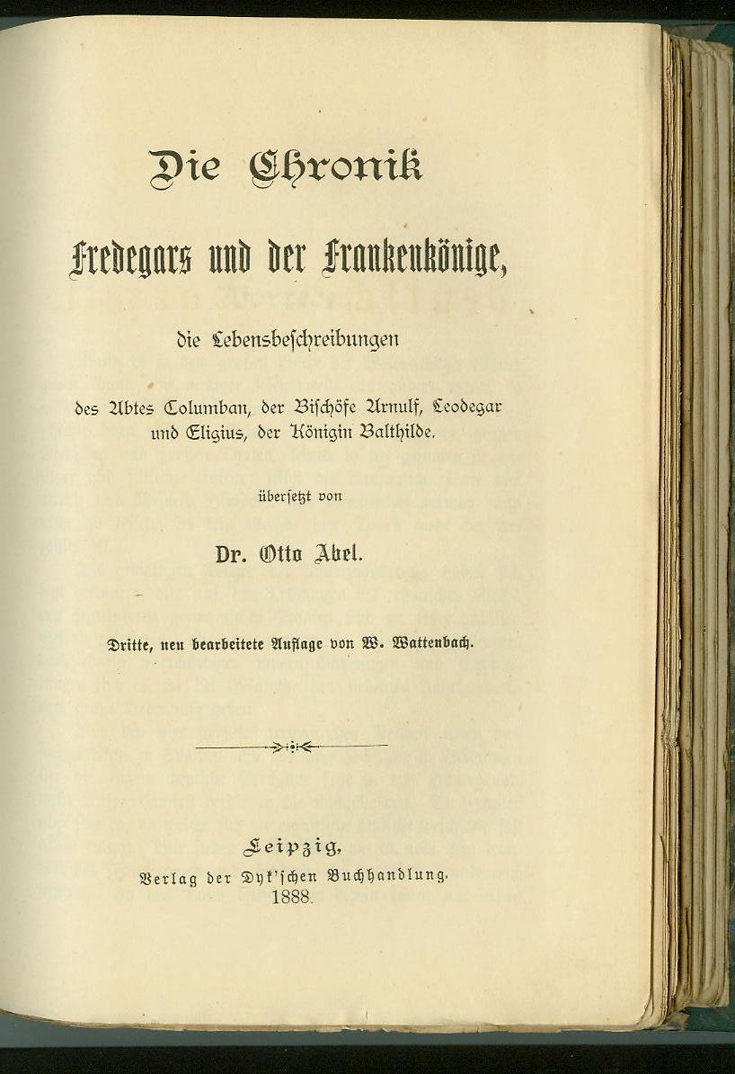 Titelseite – Die Chronik Fredegars und der Frankenkönige, die Lebensbeschreibungen des Abtes Columban, der Bischöfe Arnulf, Leodegar und Eligius, der Königin Balthilde. übersetzt von Dr. Otto Abel